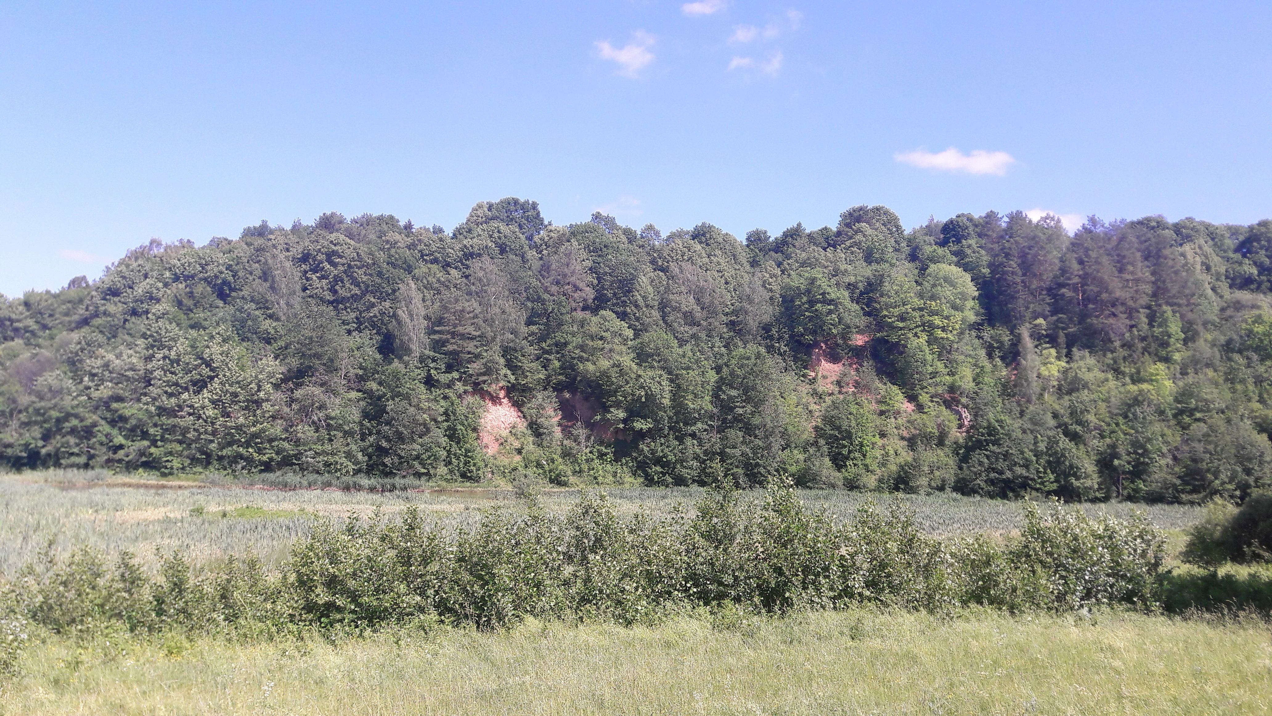 Ožkų pečius ties Verknės ir Nemuno santaka